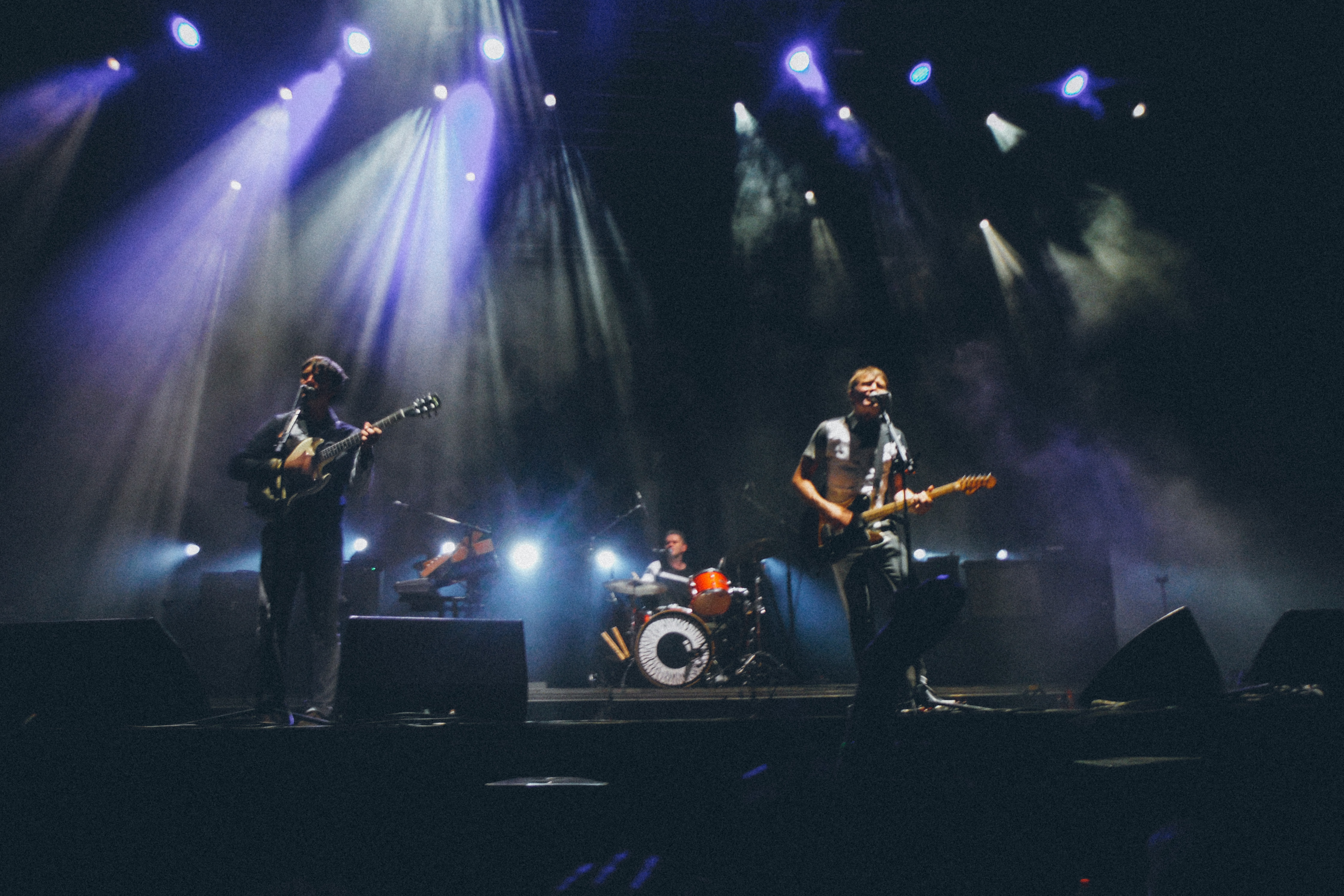 Concierto Franz Ferdinand 101 Sun Festival 2014, Málaga, España.